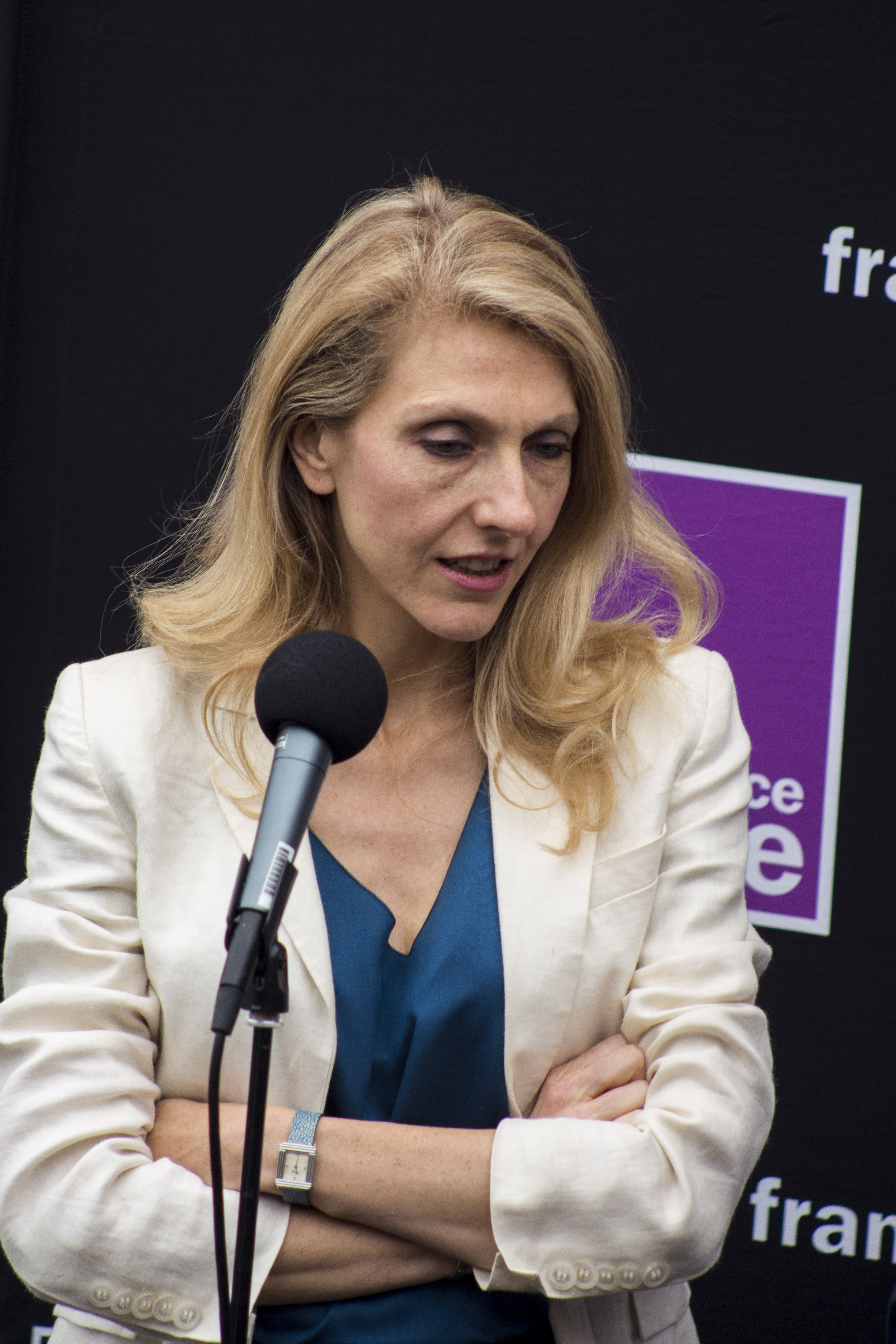 Sybile Veil à la cérémonie de remise du prix France Culture cinéma des étudiants à Cannes, le 13 mai 2018